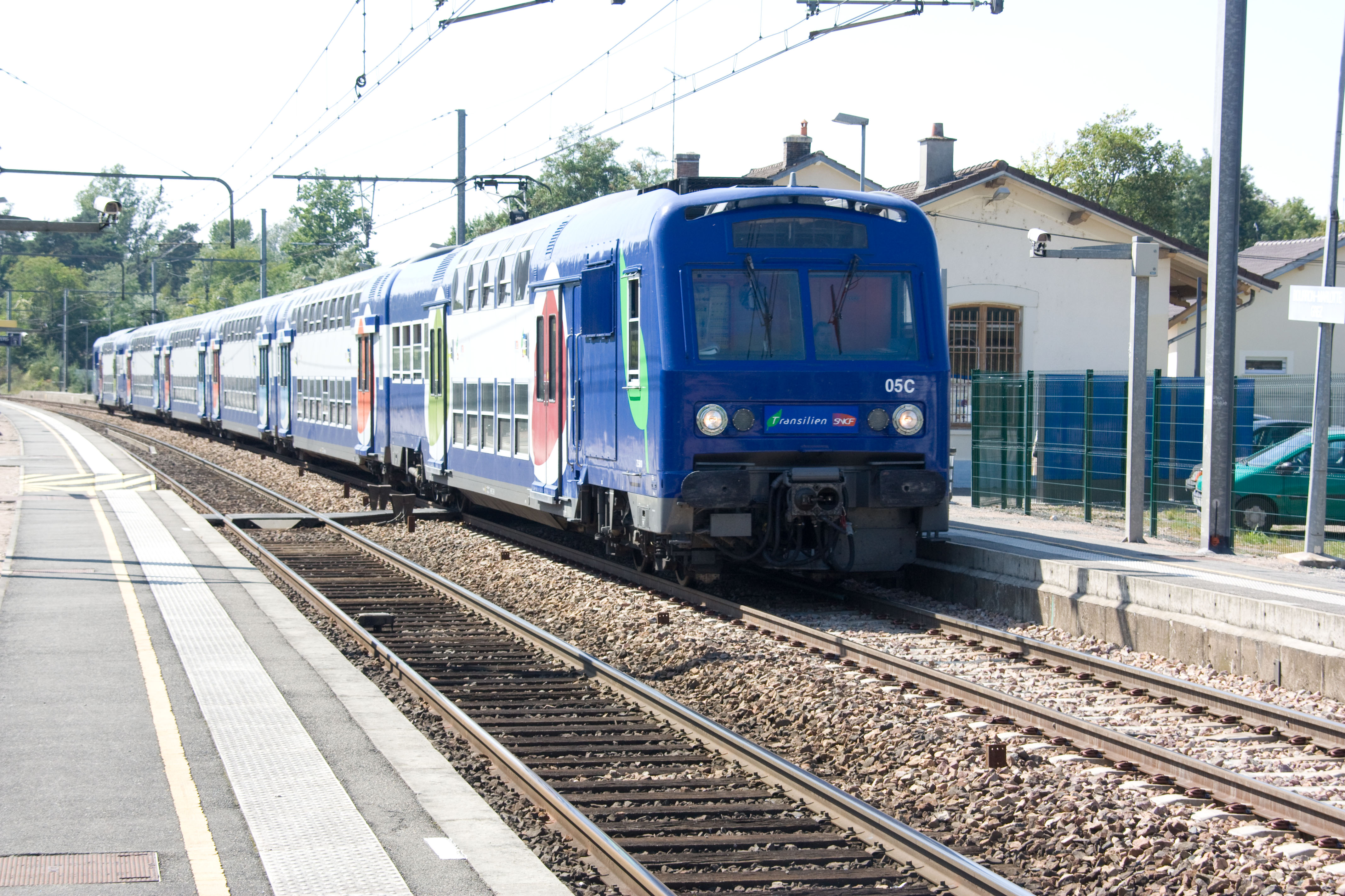 Gare de Bourron-Marlotte - Grez. Montigny-sur-Loing, Seine-et-Marne, France.